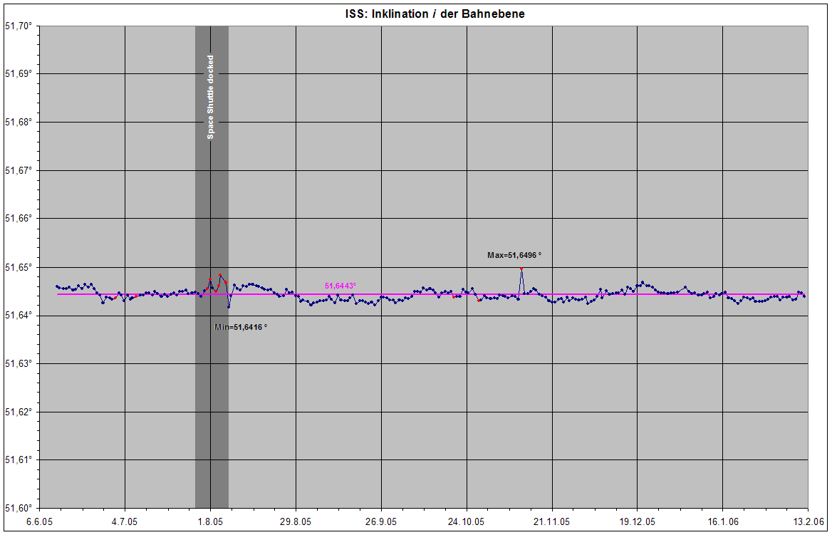 Internationale Raumstation: Verlauf der Inklination